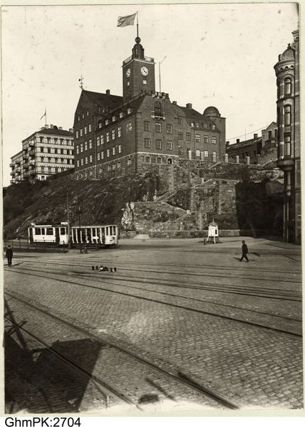 Navigationsskolan, Göteborg 1922, Bildsamlingen, Göteborgs stadsmuseum, GhmPK-2704.